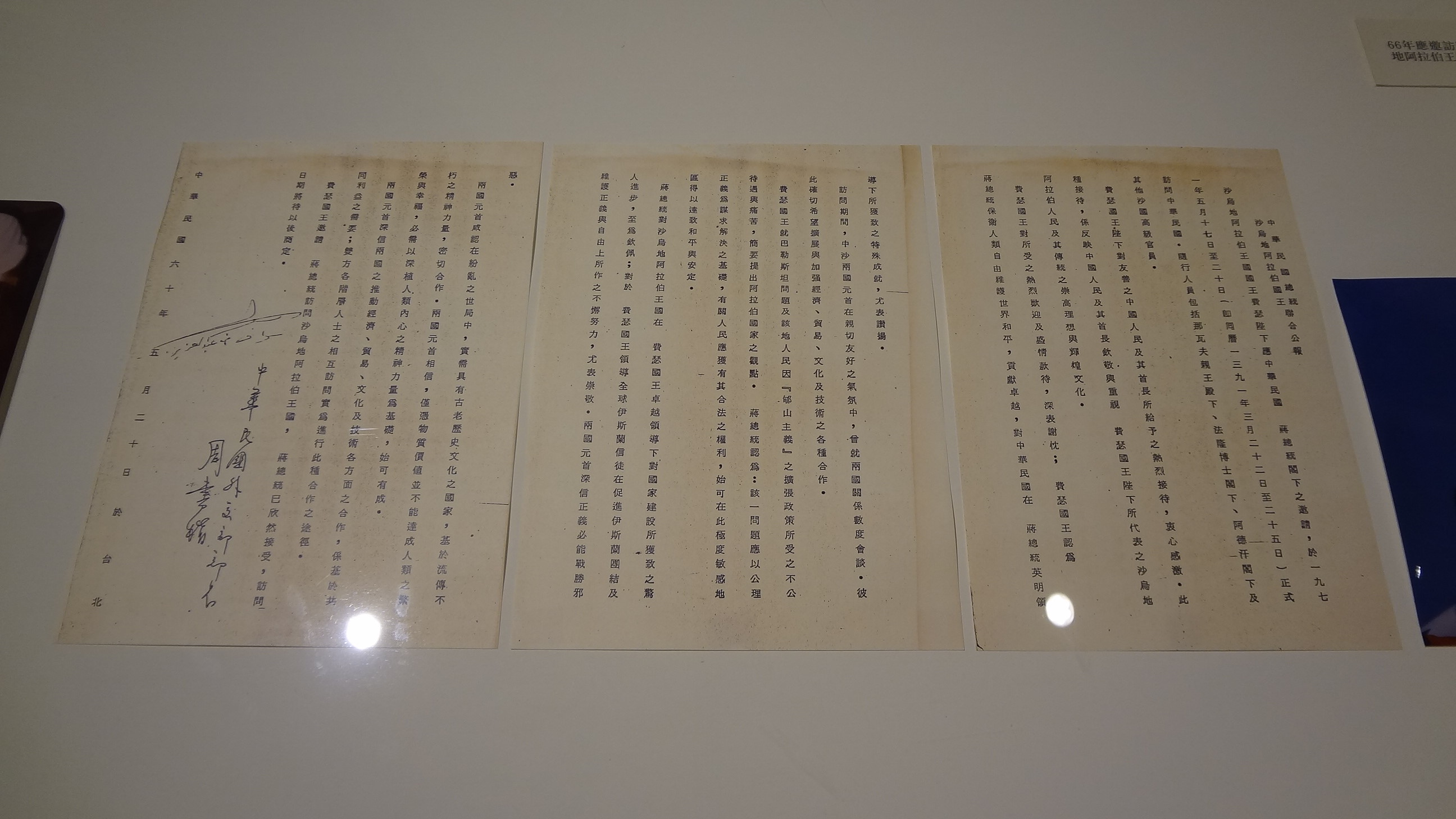 中華民國國立國父紀念館展示的嚴家淦文物：1971年5月20日，中華民國總統蔣中正與沙烏地阿拉伯王國國王費瑟聯合公報。